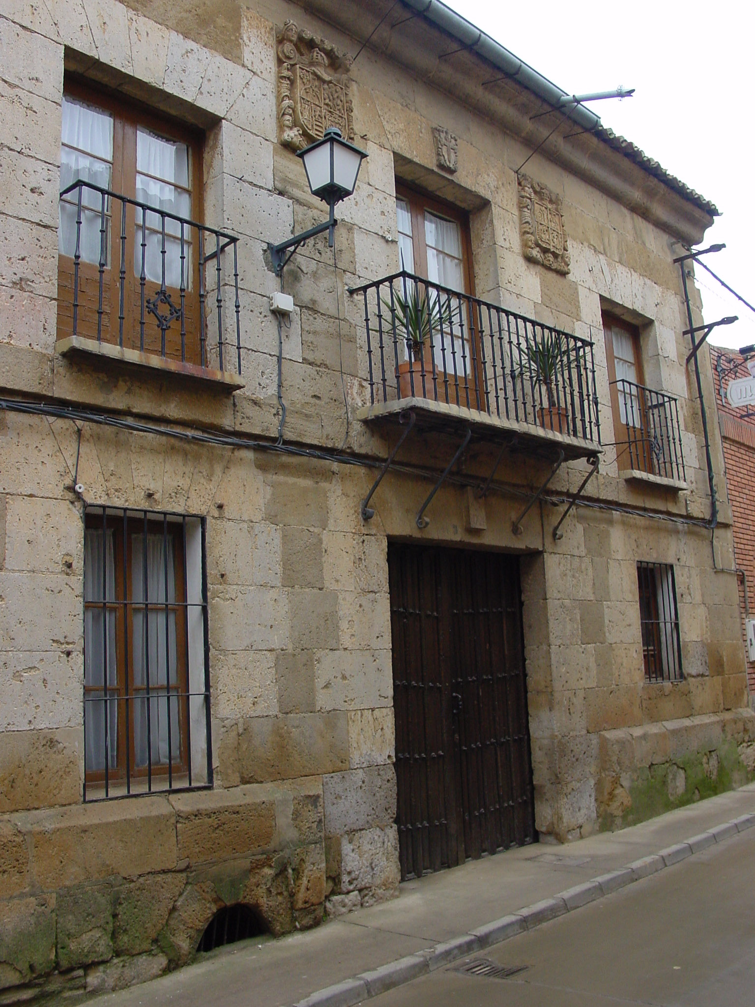 Valderas (León, España). Casa noble en la calle de Castrillo. Autor de la imagen: Lourdes Cardenal, enero 2006.